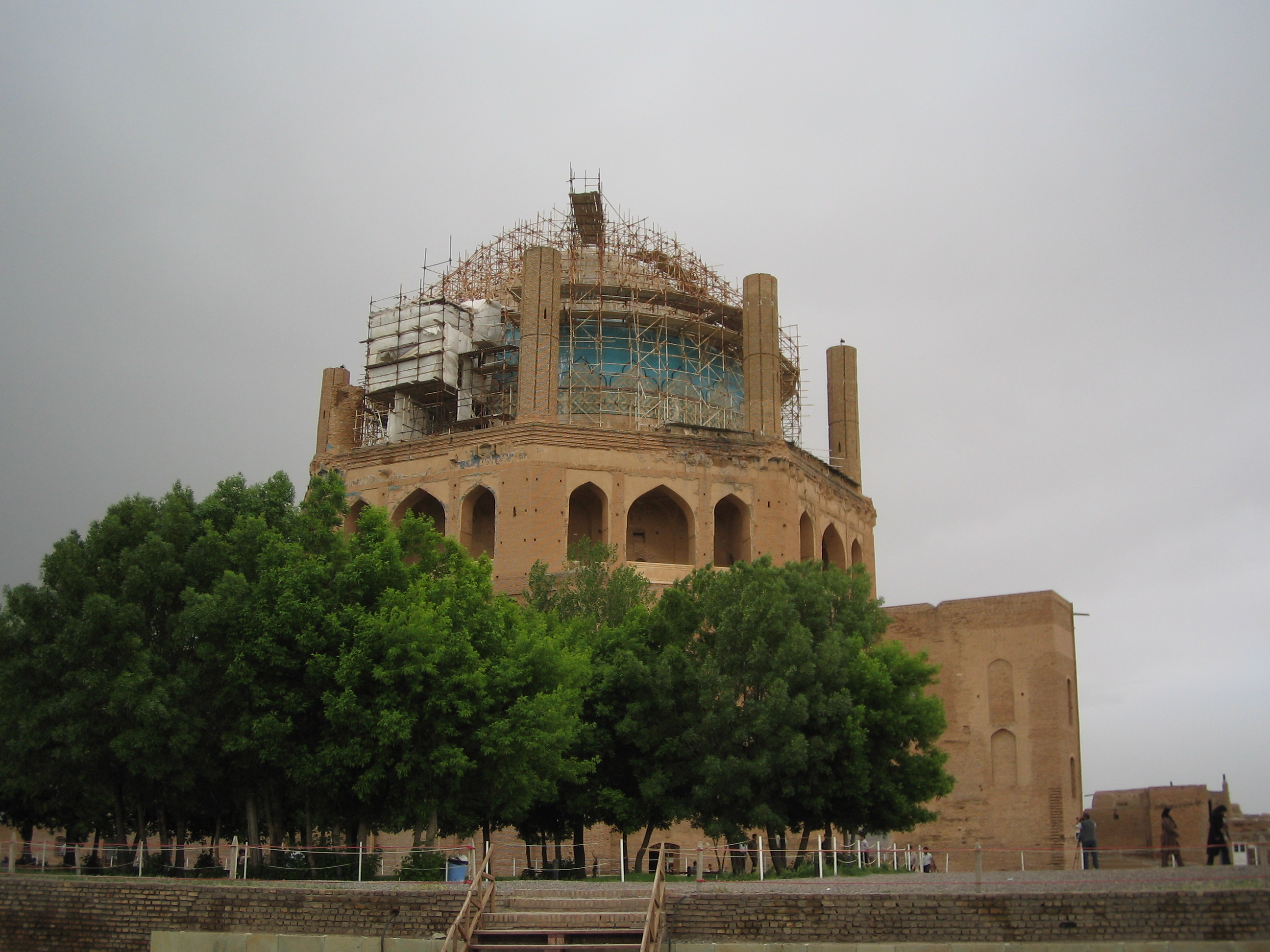 Soltanieh, Zanjan, Iran (گنبد سلطانیه، زنجان، ایران)